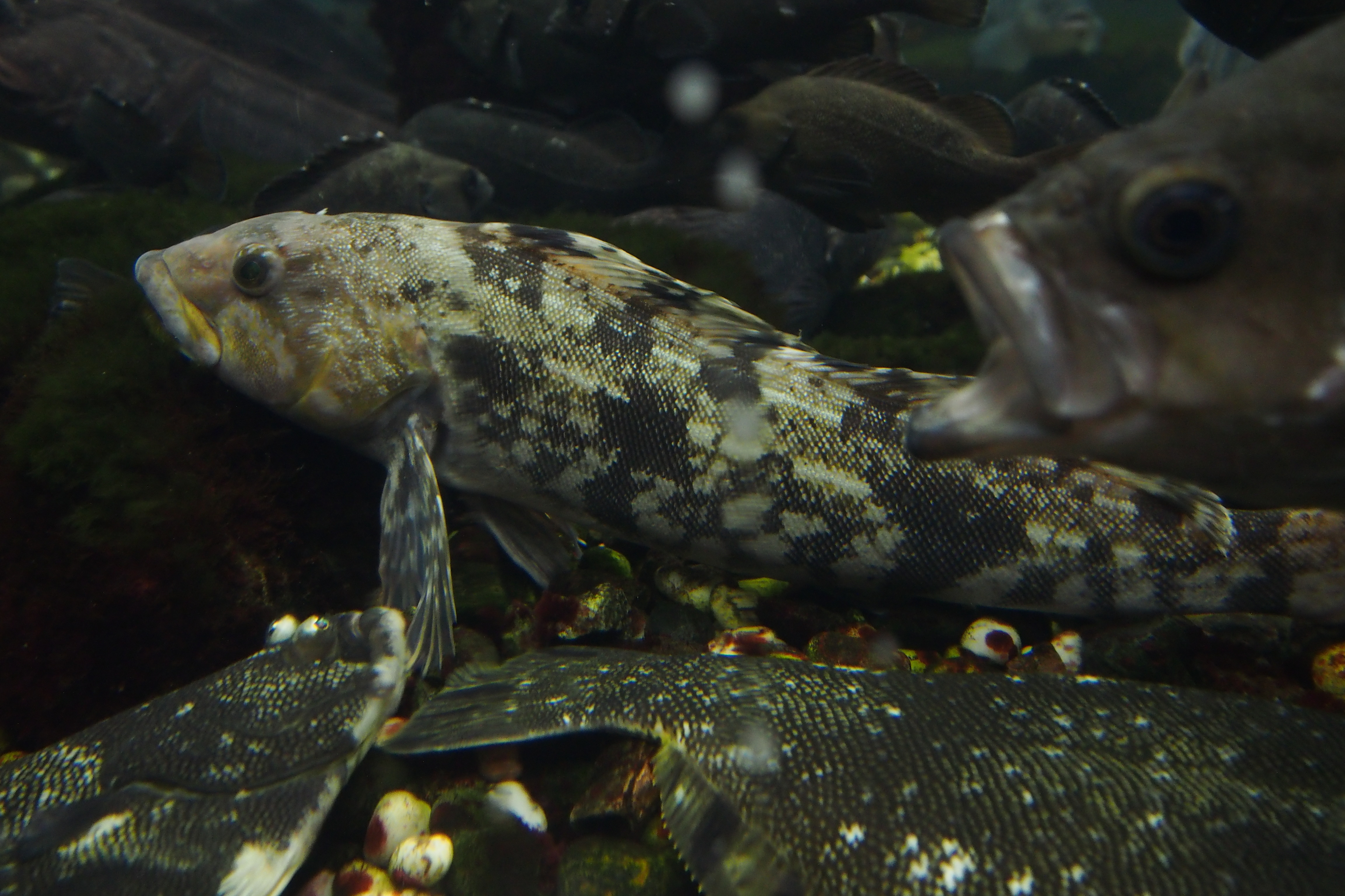 in Sunpiazza aquarium.